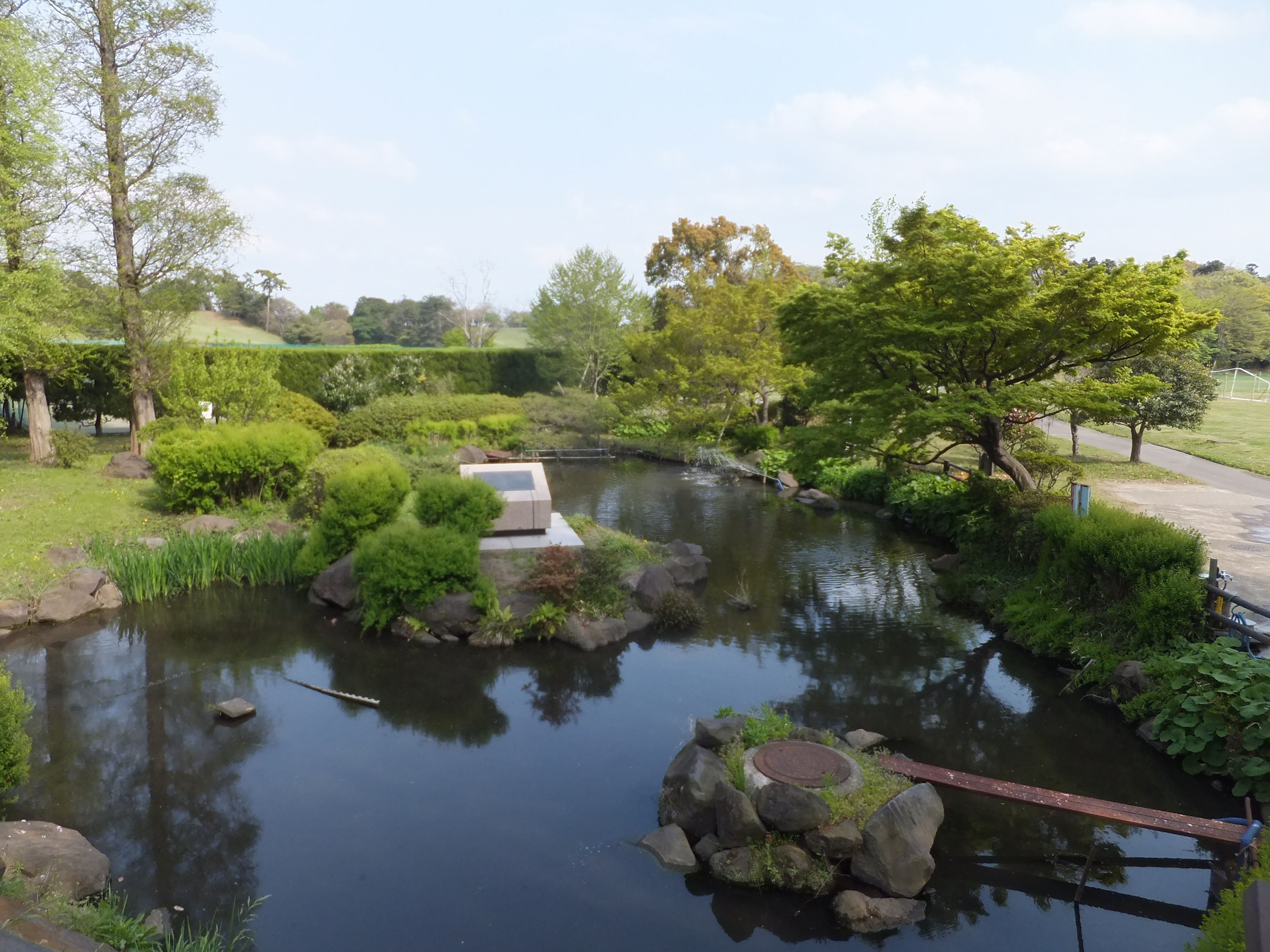 大賀ハス発祥の地（千葉市花見川区）。東京大学検見川総合運動場に隣接する。